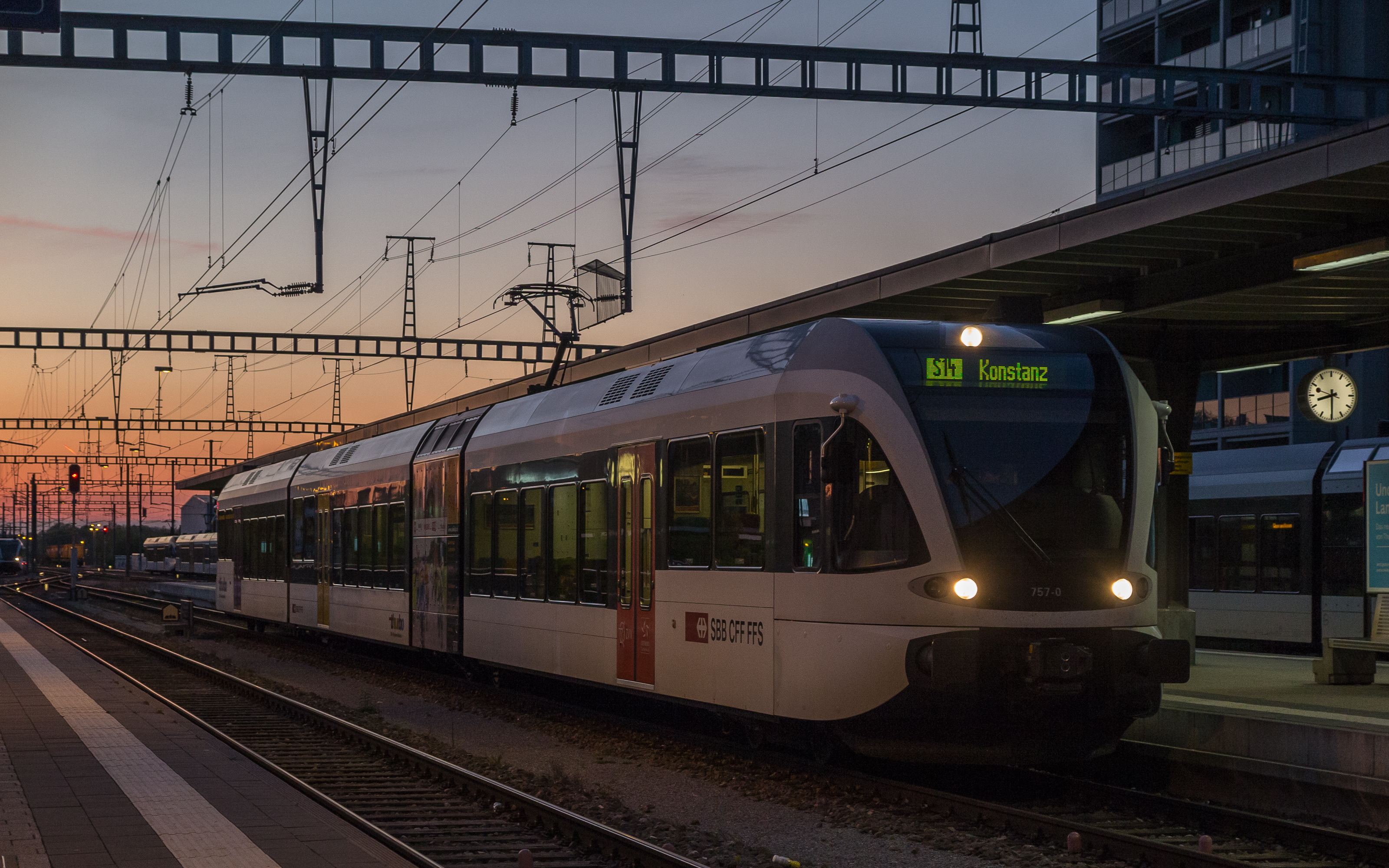 Abendliche S14 nach Konstanz im Bahnhof Kreuzlingen (April 2017)